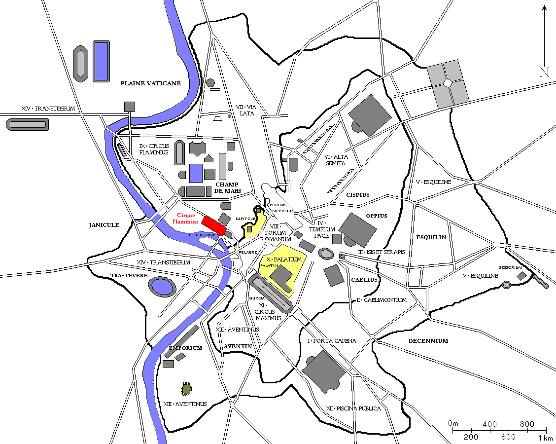 Plan de Rome redessiné à partir de diverses sources. Tous les bâtiments importants construits jusqu'à la fin de l'Empire romain sont dessinés, ainsi que les régions d'Auguste et les collines de Rome. Auteur : ColdEel En rouge, le cirque Flaminius.